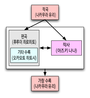 가넷 크로우의 악곡 제작의 흐름을 해설한 그림입니다.